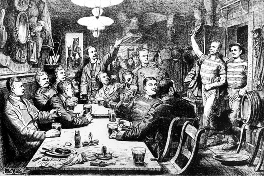 Im Früh­jahr 1880, am 7. Mai, wurde der „Düssel­dorfer Ruder­verein 1880" gegründet. Heim­statt wurde die Gast­stätte „Uel" auf der Ratinger Straße.